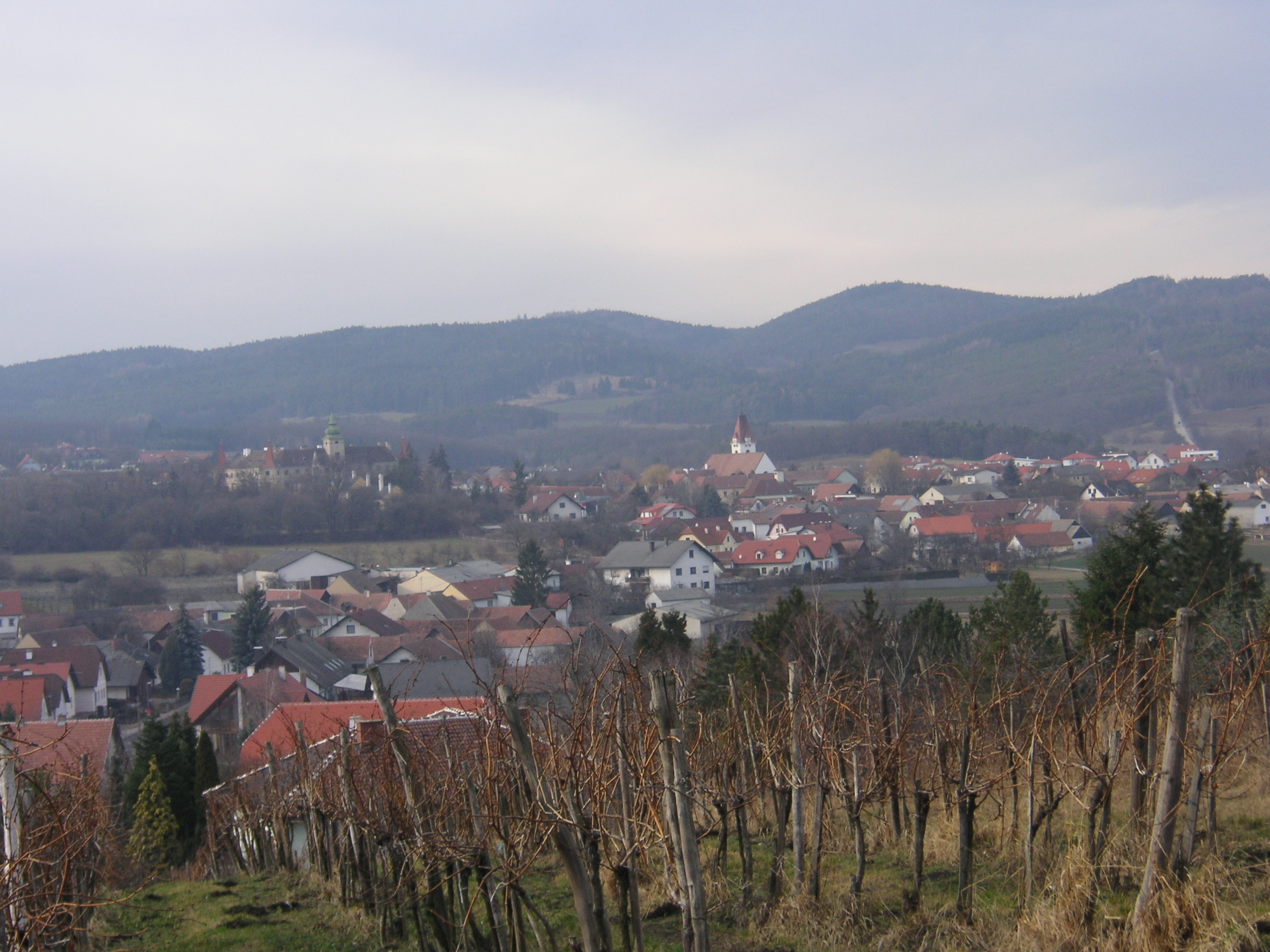 Ein Blick über die Ortschaft Droß in Niederösterreich